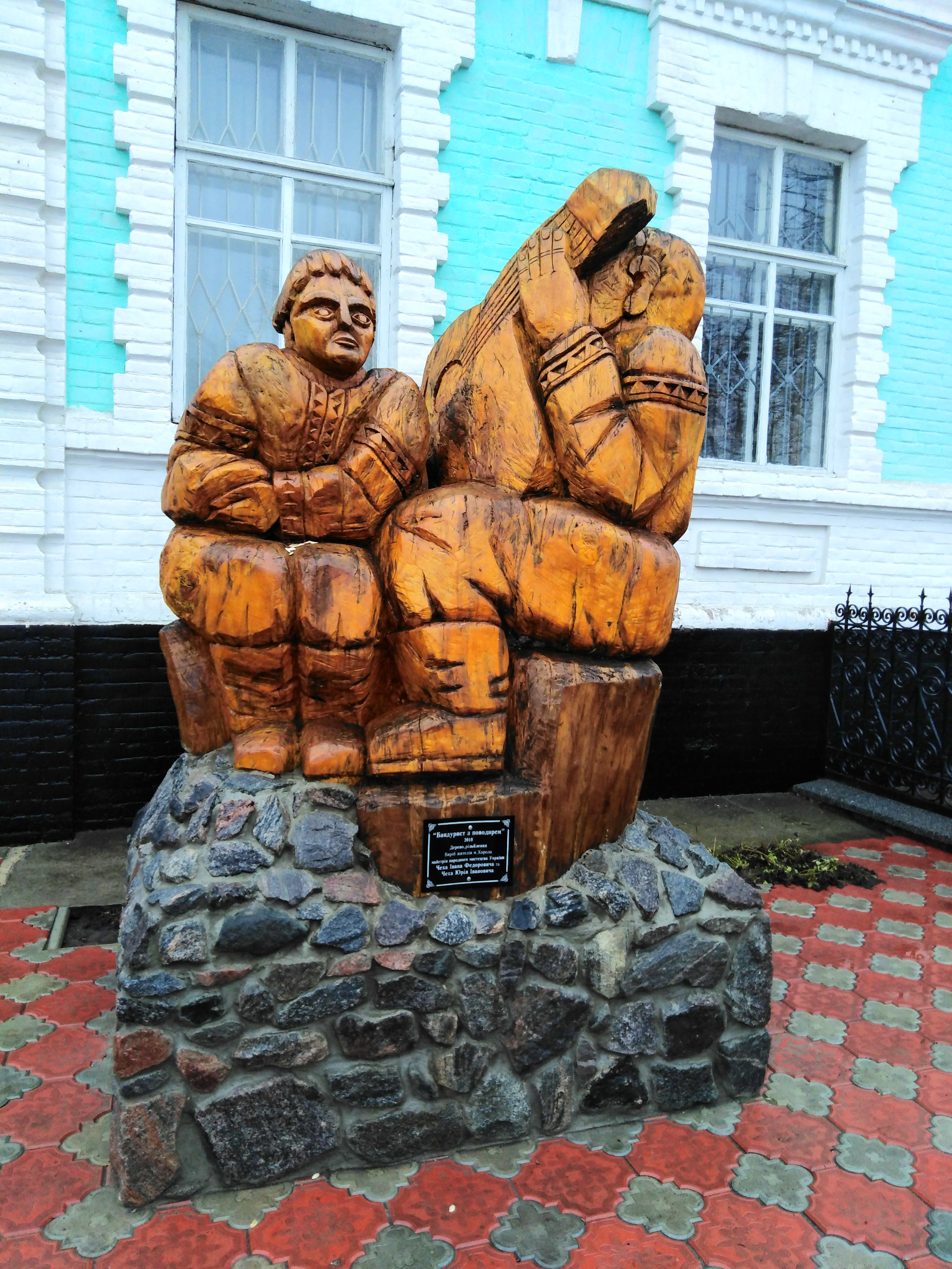 Україна. Полтавська область. Місто Хорол. Композиція "Бандурист з поводирем", біля будівлі музею.